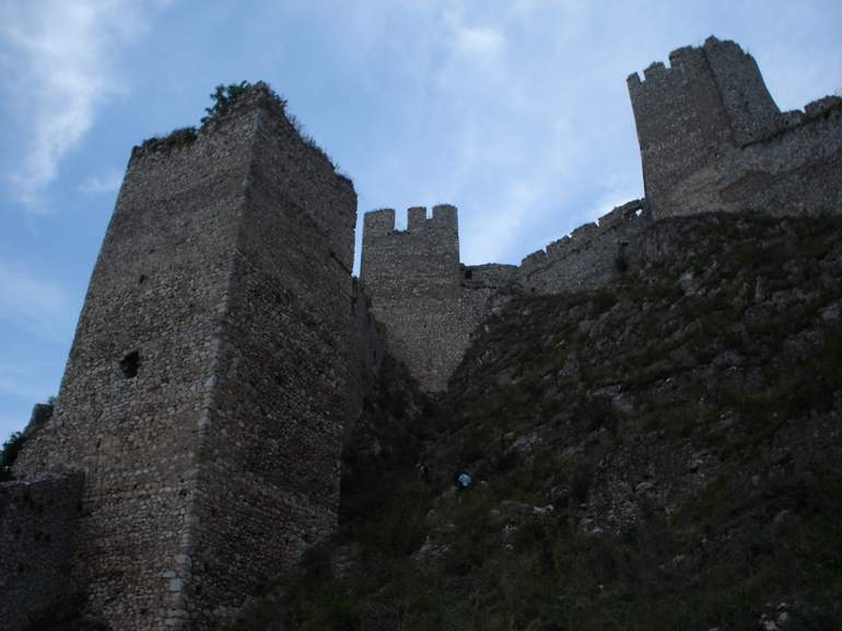 Prednji grad(Front town).